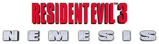 Resident Evil 3 Logo